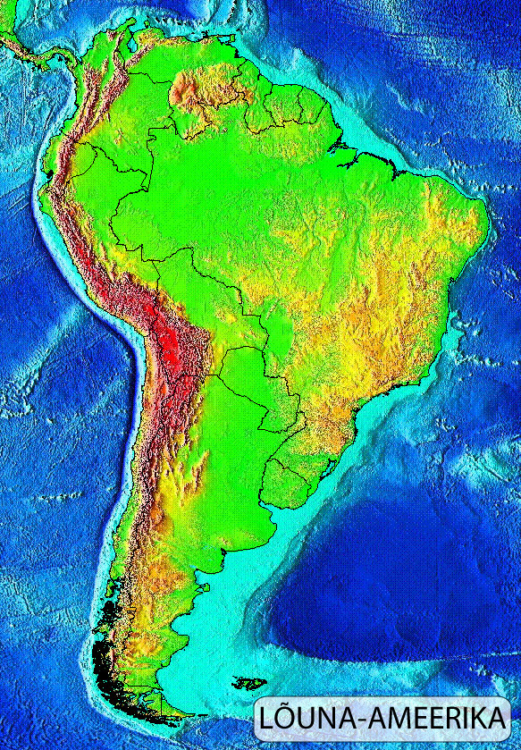 Lõuna-Ameerika reljeef